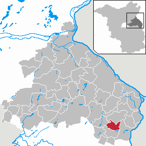 Fichtenhöhe in Brandenburg (Country) - District Märkisch-Oderland